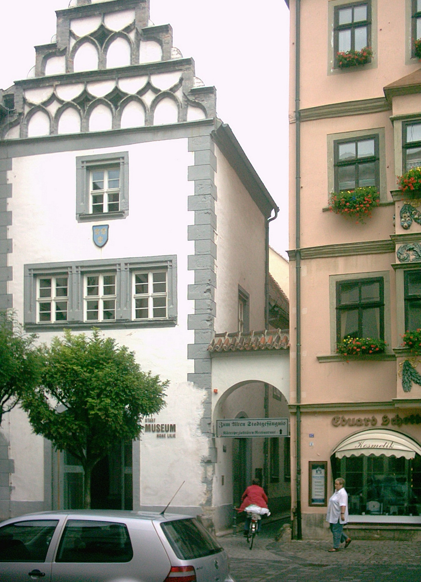 Stadtmuseum „Hohe Lilie“ in Naumburg, Deutschland.